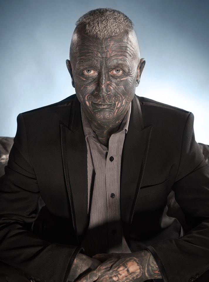 Fotografie vytvořená k účelu propagace prezidenského kandidáta nezávislou občanskou iniciativou "Vladimír Franz prezidentem", která ji uvolnila na svém webu k volnému použití.